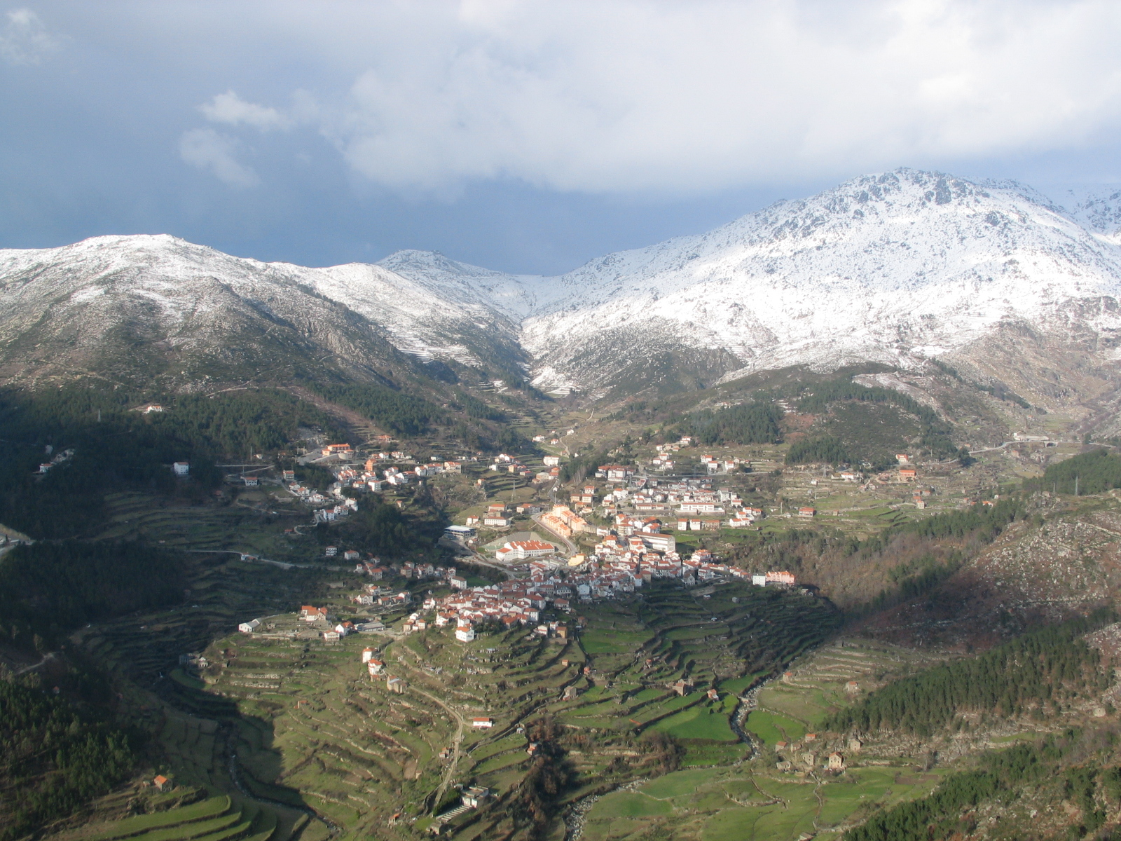 Casario de Loriga rodeada de neve. This is a photography of a Site of Community Importance in Portugal with the ID: PTCON0014. Natura2000 entry, EEA entry